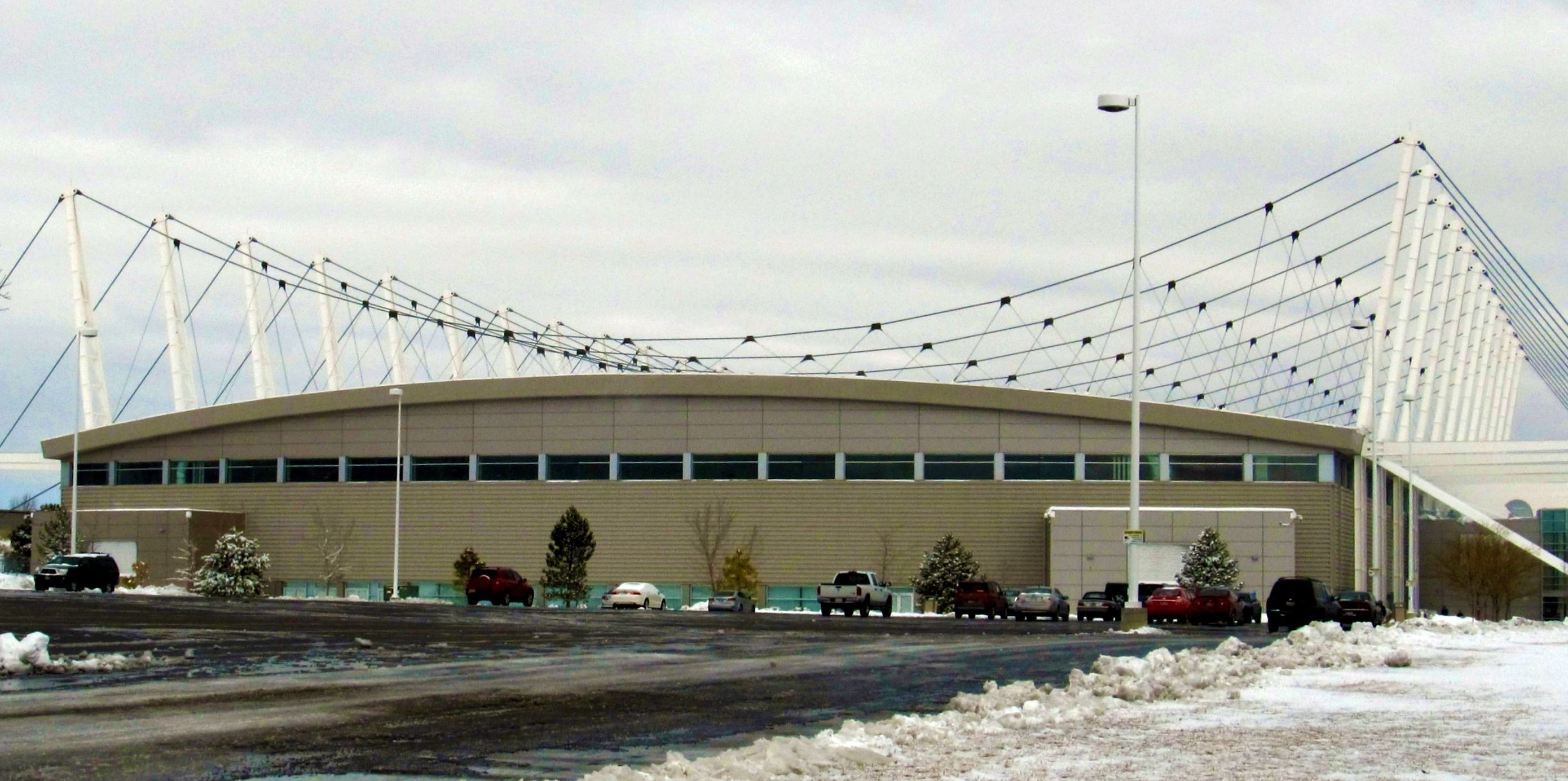 Utah Olympic Oval, Kearns, Utah